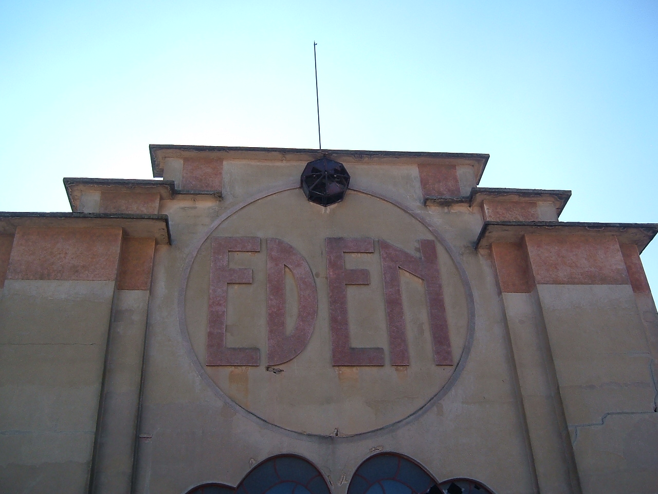 Le cinéma "Éden" à Saint-Jean-d'Angély (Charente-Maritime, France).